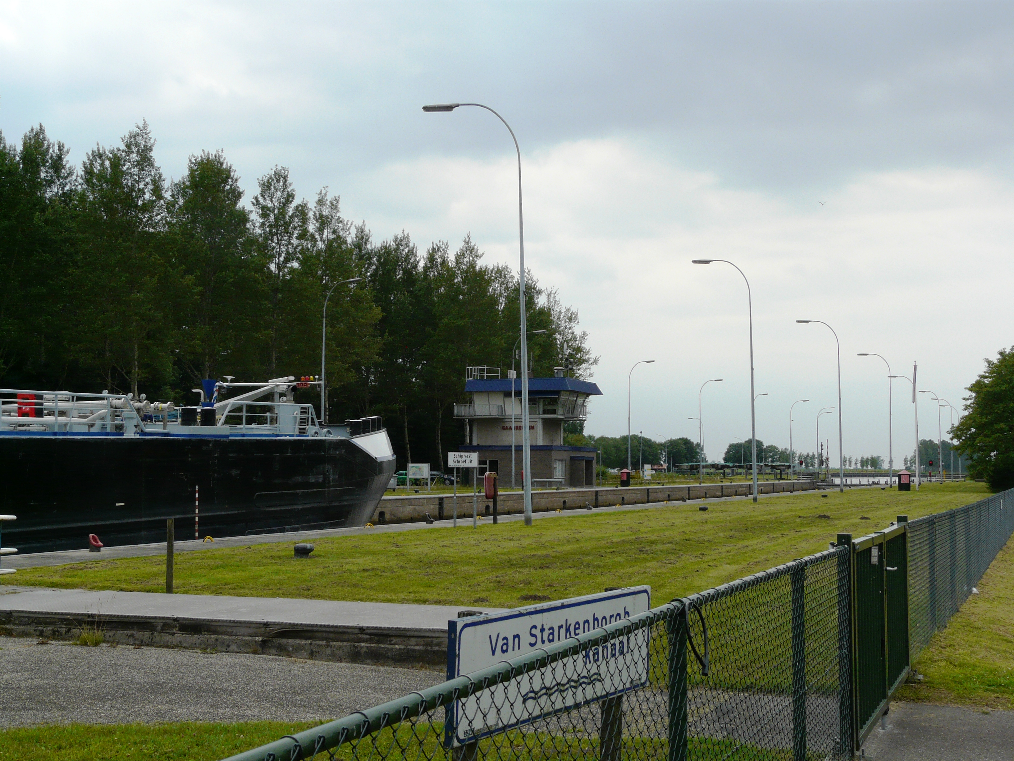 Sluis Gaarkeuken gezien vanaf de weg Buikstede (westen).